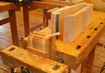 En fileklemme bruges til at fastholde emner, der skal files eller på anden måde bearbejdes, når det ville være ubekvemt med fastspænding af emnet direkte i en af høvlebænkens tænger. På billedet er en lille fileklemme ("bedstemors tandsæt") anbragt i høvlebænkens bagtang. Den store fileklemme af svensk fabrikat, der ligger oven på høvlebænken, passer kun i fortangen, fordi den ikke som den lille fileklemme har en spalte, som spindelen kan passe ned i.